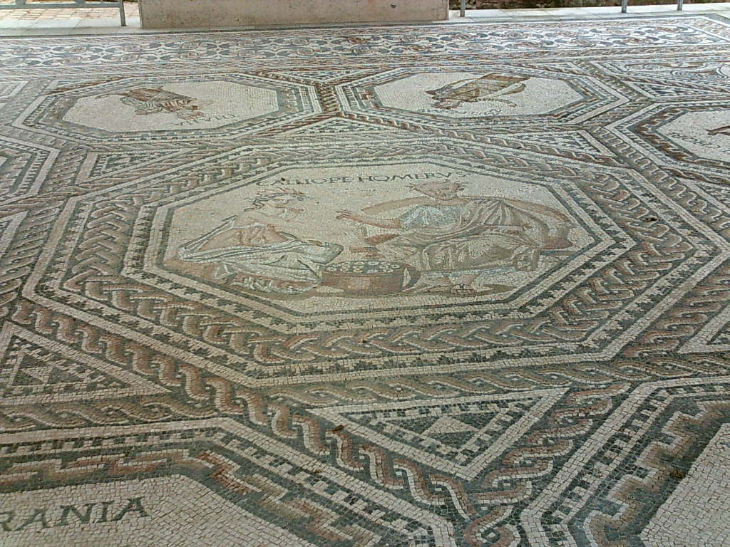 Kalliope und Homer auf dem röm. Mosaik in Vichten, selbst fotografiert, April 2006, --Xocolatl 11:10, 22 April 2006 (UTC)